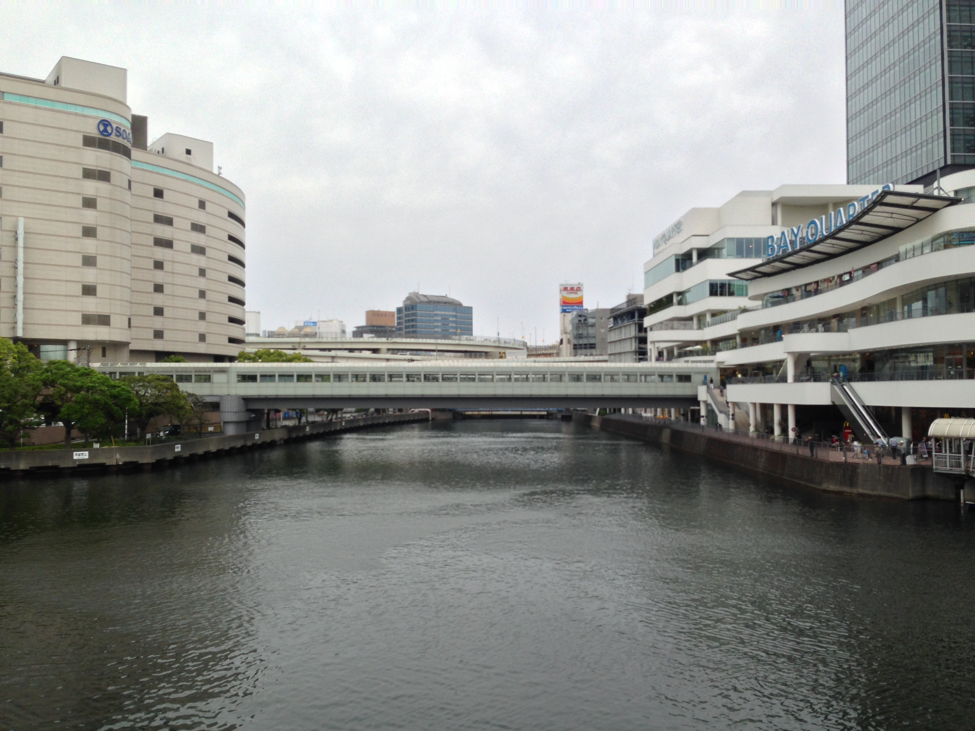 横浜駅東口のそごう（新都市ビル）2階とベイクォーターを結ぶペデストリアンデッキ「かもめ歩道橋」。